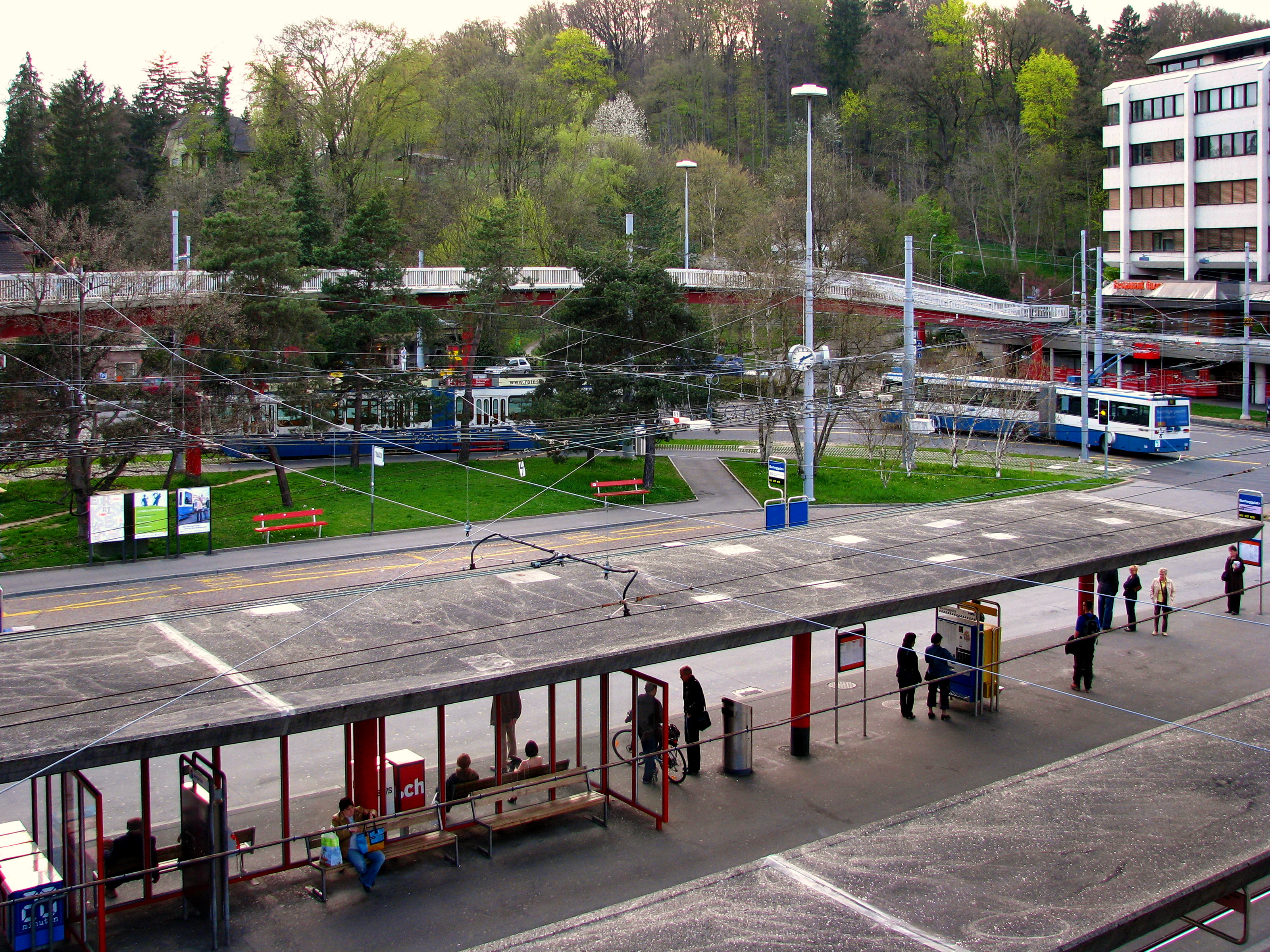 Bucheggplatz in Zürich, Käferberg in the background